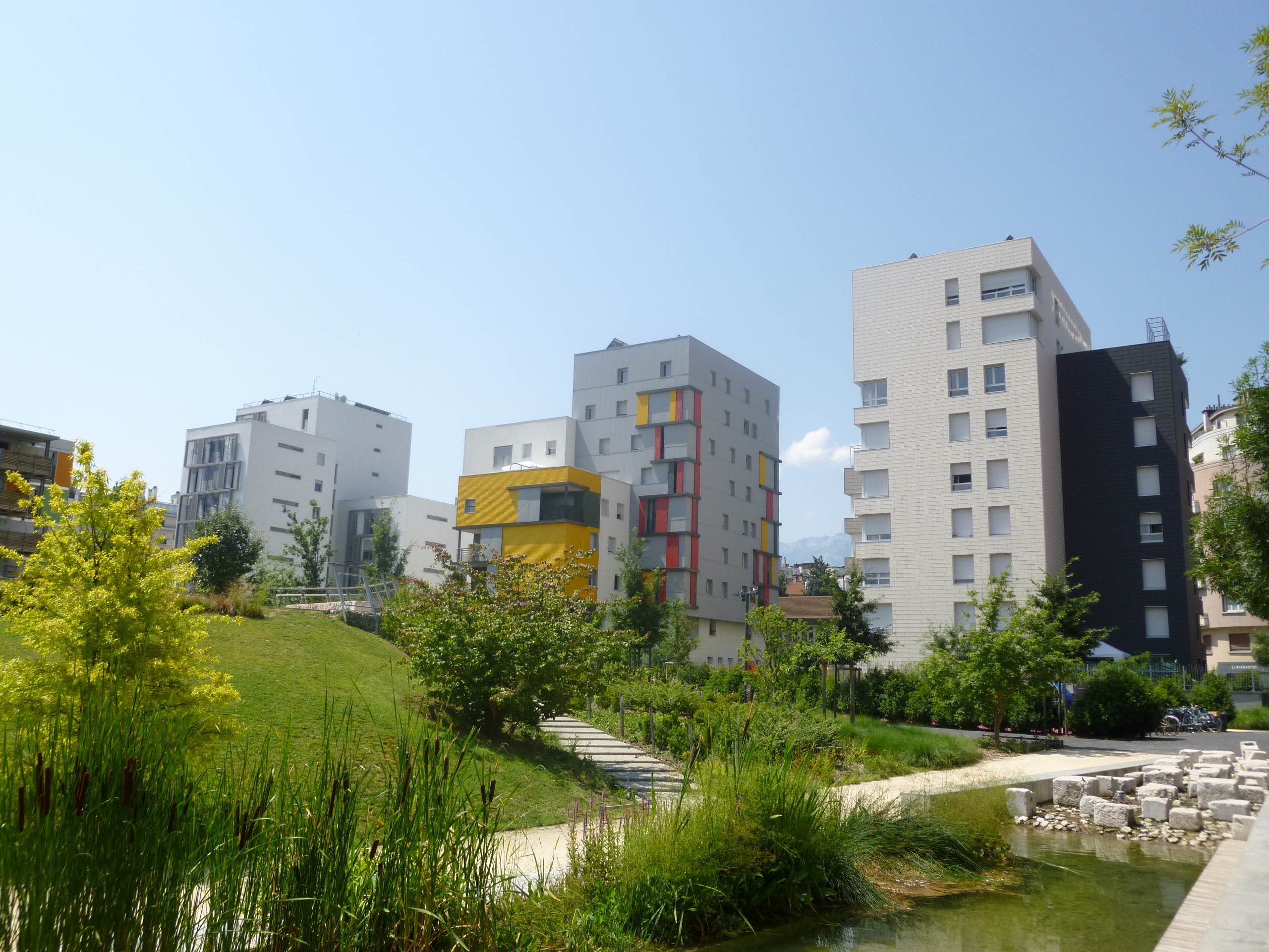 Ecoquartier de Bonne - Grenoble